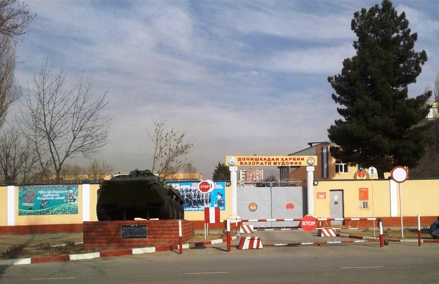 КПП, Военный институт, Душанбе